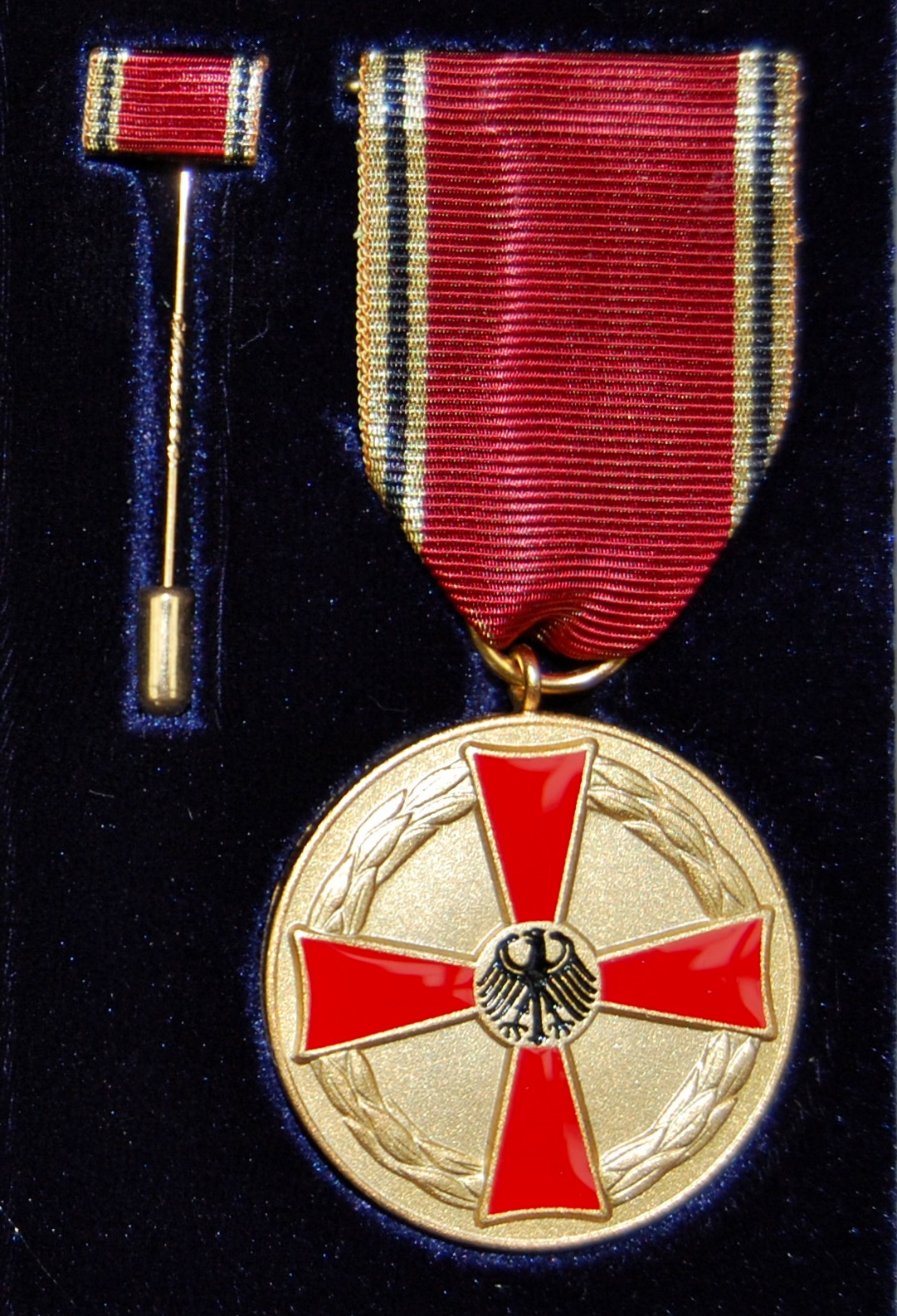 Verdienstmedaille des Verdienstordens der Bundesrepublik Deutschland mit Anstecknadel